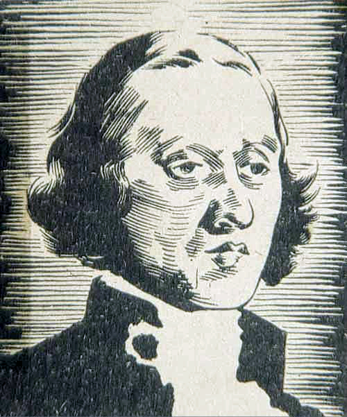 Grabado idealizado de Joaquín Toesca, 1745-1799. No existen retratos contemporáneos de Joaquín Toesca.